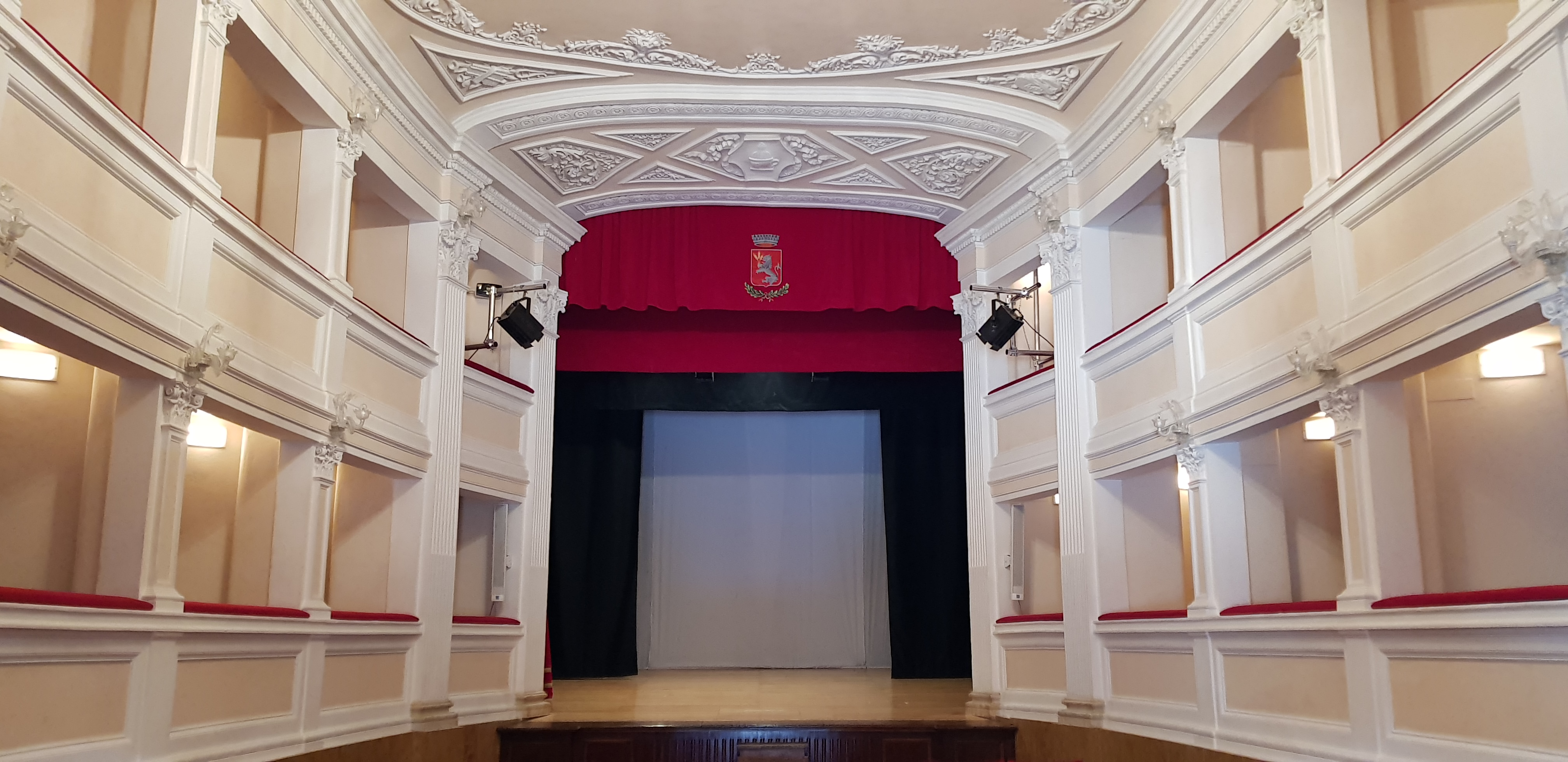 Il Teatro degli Oscuri, nel centro storico di Torrita